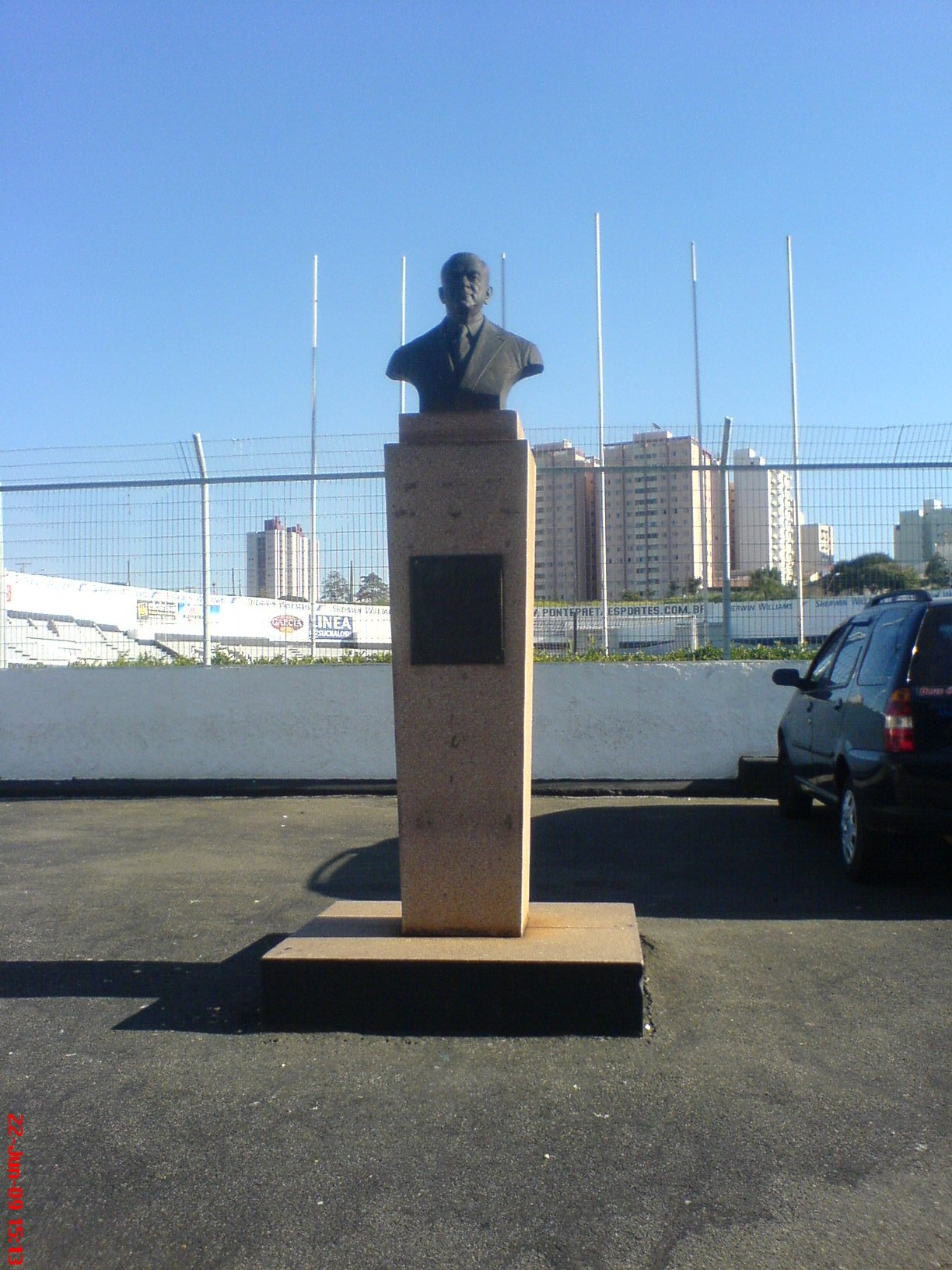 Monumento no Estadio Moises Lucarelli